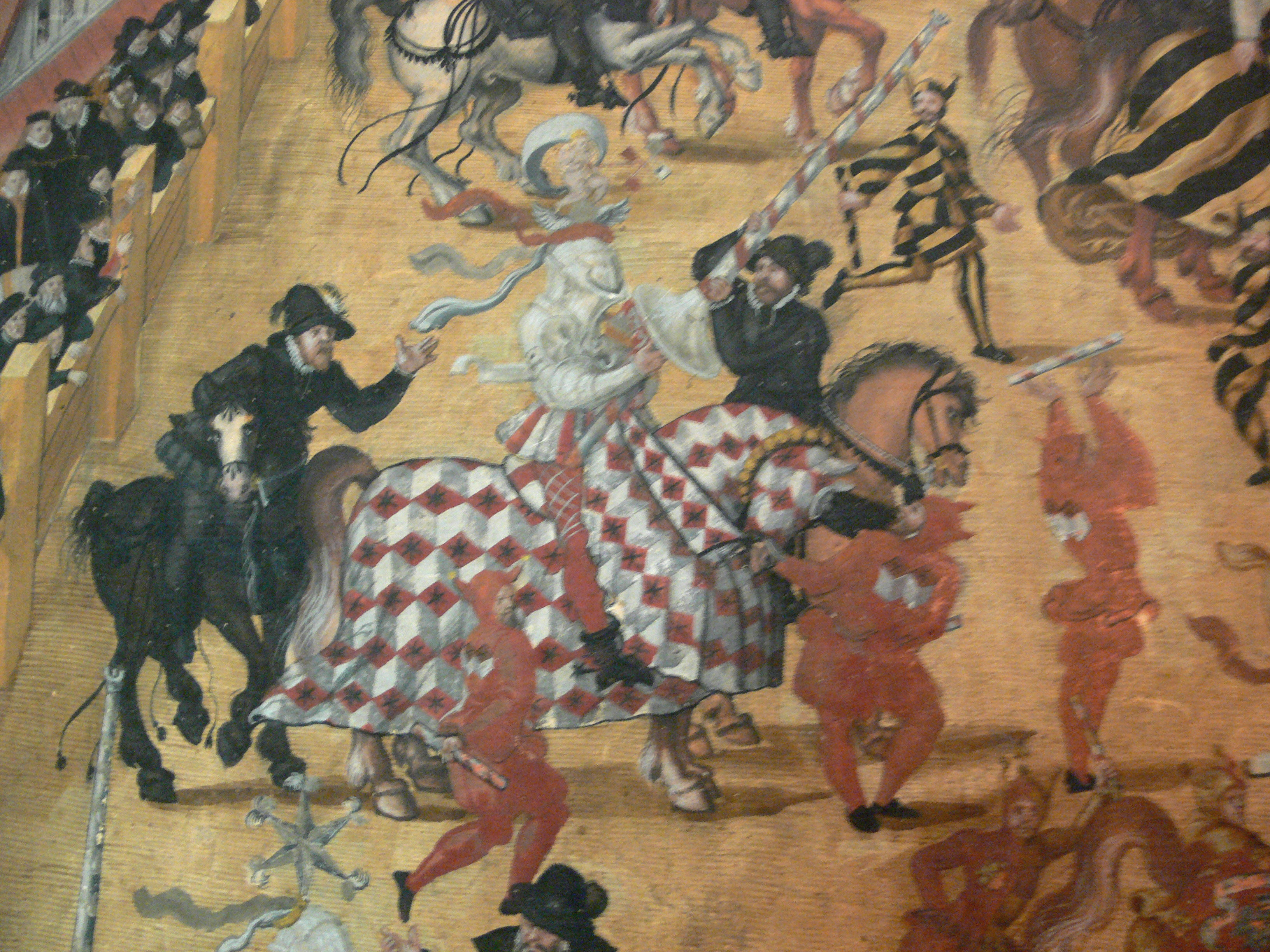 Jost Amman: Gesellen-Stechen der bürgerlichen Patrizier-Söhne Nürnbergs, vom 3. März 1561. Nürnberg, 1561. Bayerisches Nationalmuseum München, Inv. 49/43